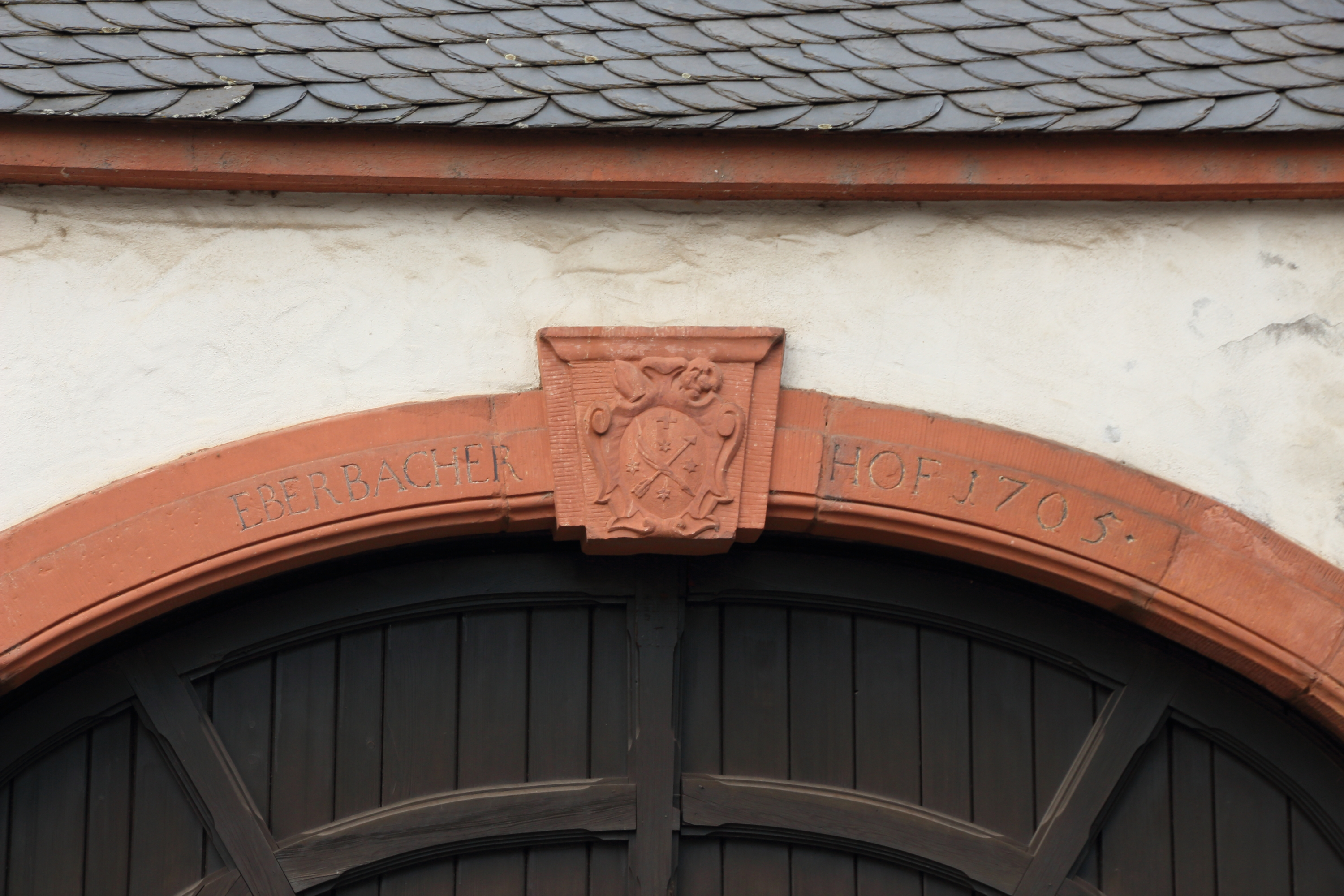 Wappen des Eberbacher Abtes Michael Schnock über dem Torbogen des Eberbacher Hofes, bezeichnet mit 1705. Rüdesheimer Straße 32, Geisenheim am Rhein.